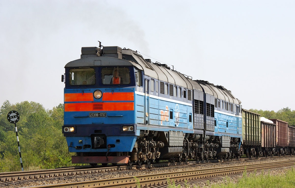 Тепловоз 2ТЭ116-1737 с поездом, Ростовская область, СКЖД